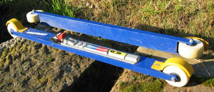 rollski